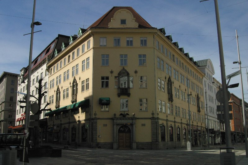 Svaneapoteket i Bergen